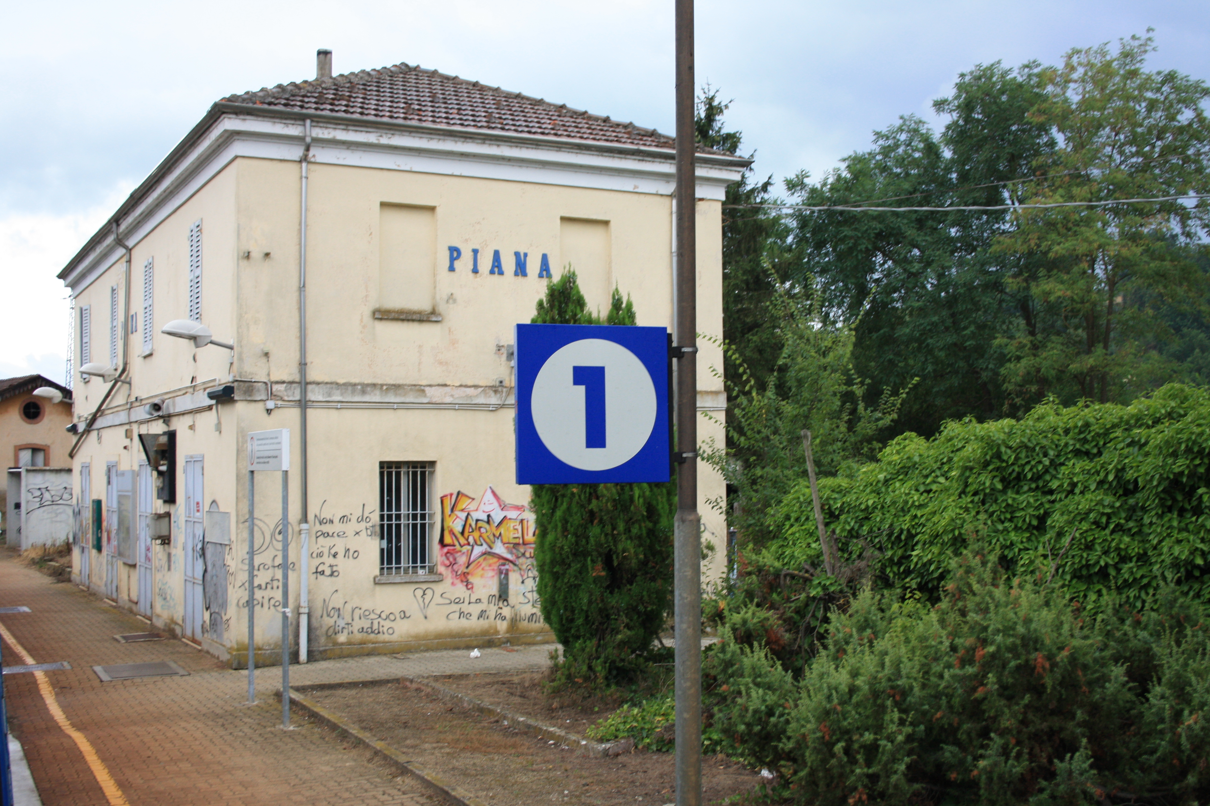 Stazione ferroviaria di Piana. Lato binari del dismesso fabbricato viaggiatori